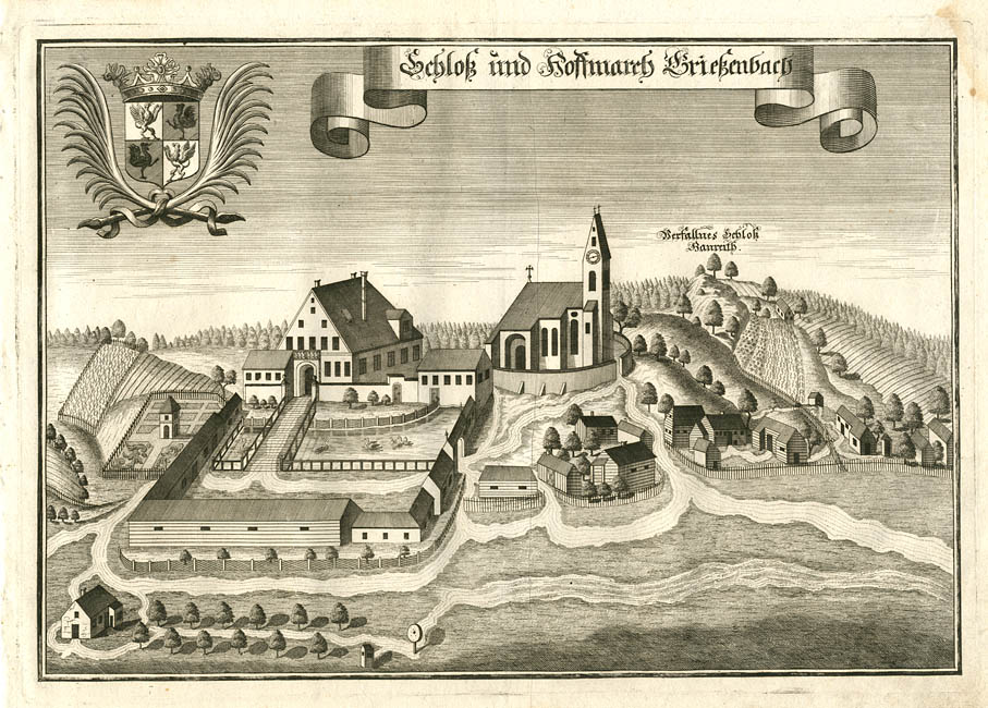 “Schloß und Hoffmarch Grießenbach” (Postau-Grießenbach), aus: Beschreibung des Churfürsten- u. Hertzogthumbs Ober- und Nidern Bayrn. Rentamt Landshut. Gericht Rottenburg, 1723